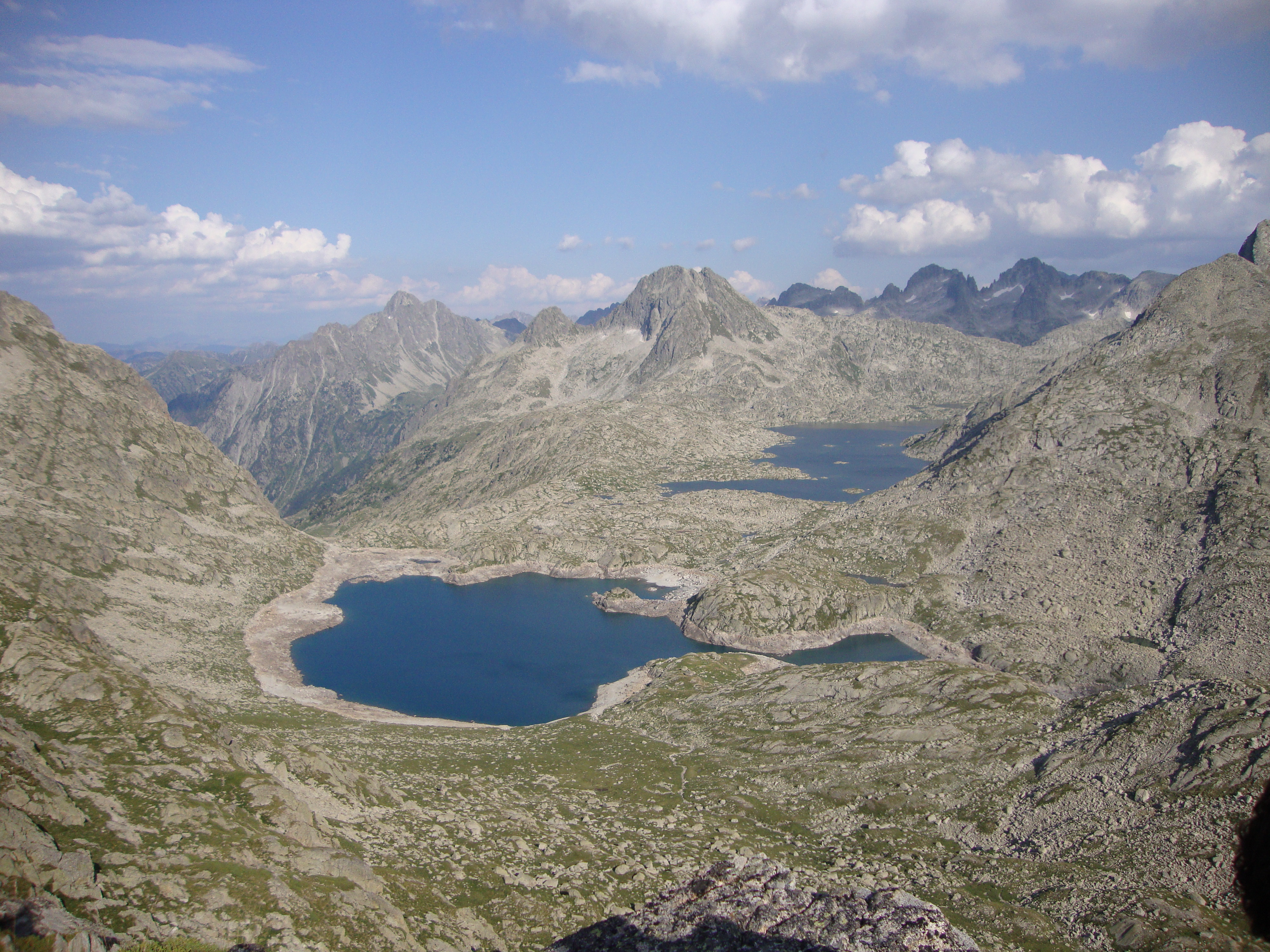 Lac de Rius e Lac Tòrt de Rius